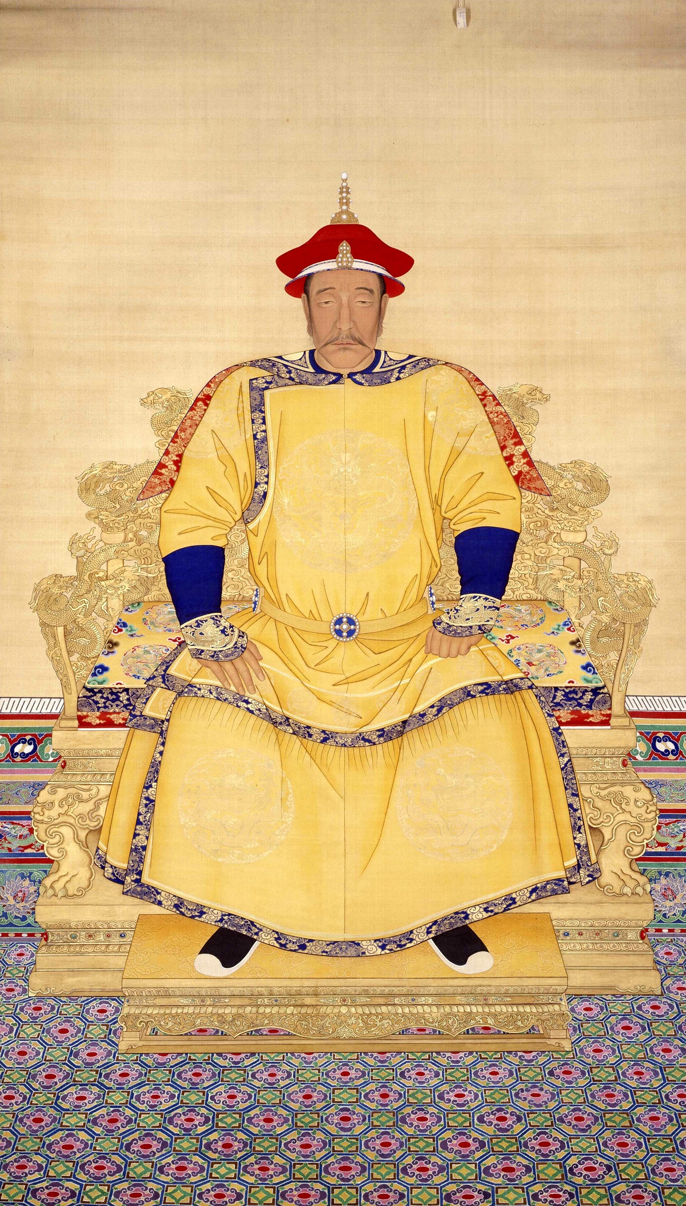 清 佚名 《清太祖天命皇帝朝服像》